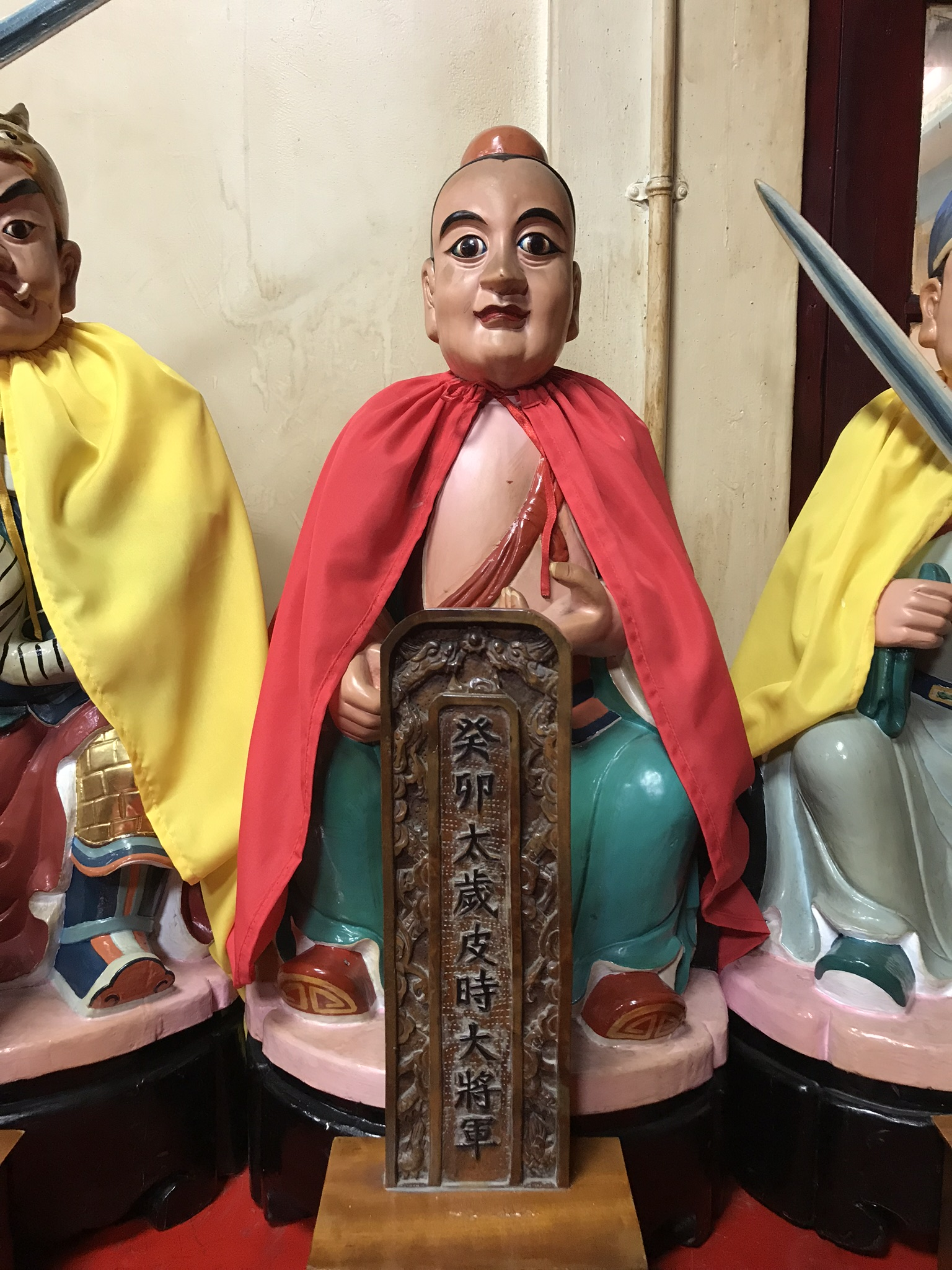 癸卯太歲皮時大將軍神像